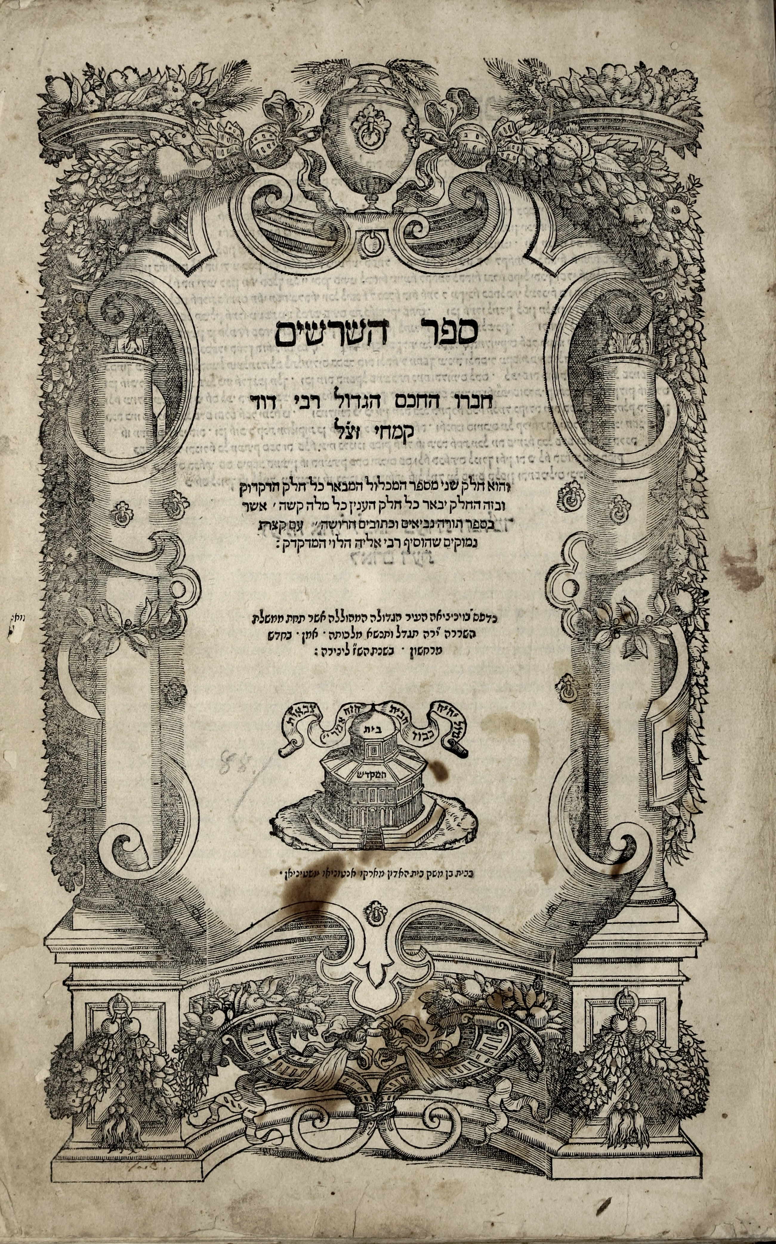 ספר השרשים לרד"ק. עמוד השער